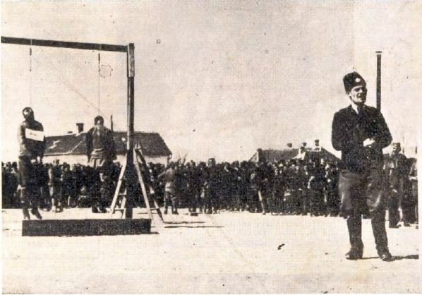 Srpskohrvatski / српскохрватски: Četnički vojvoda Budimir Bosiljčić drži govor pored obešenih partizana Ilije Katića i Tihomira Sarića (zapadna Srbija, 1942).